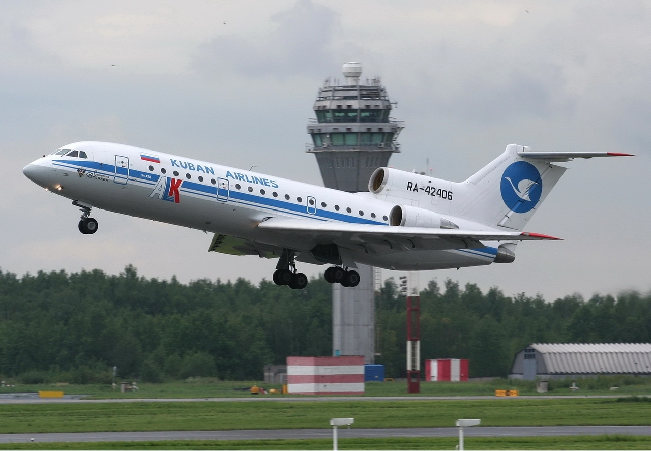 Kuban Airlines Yakovlev Yak-42D